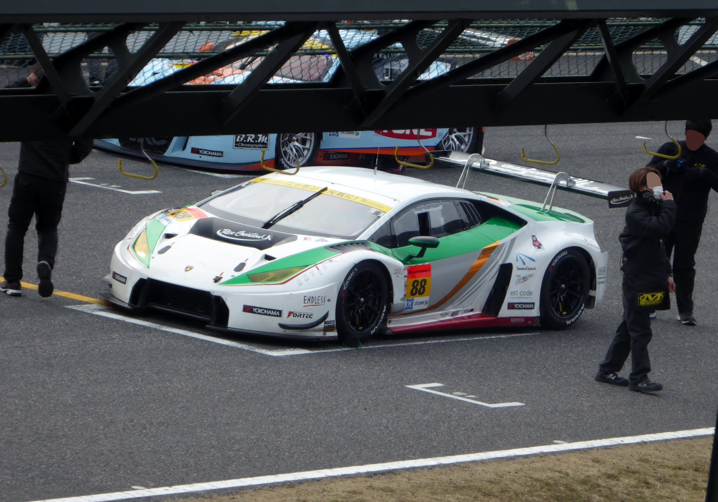 88号車マネパランボルギーニGT3の2017年仕様を撮影。